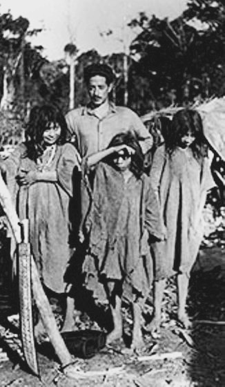 Mario Monteforte Toledo con unas niñas lacandonas en 1938.